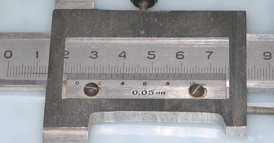 Verniero kun 20 foja pliprecizigado, kiu montras valoron 24.3 La foto estis farita de mi mem.